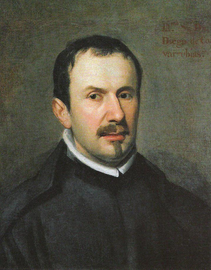 Retrato del sacerdote, escitor y humanista español Lorenzo van der Hamen (1589-1664), que fue hermano del pintor Juan van der Hamen, autor de esta obra.